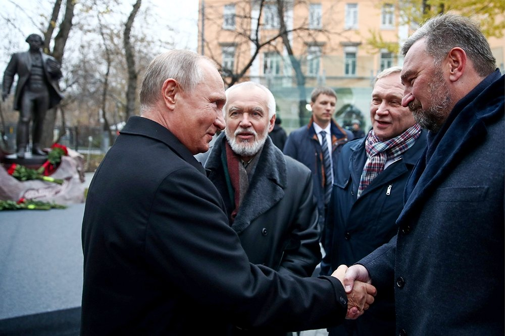 Памятник является частью архитектурно-музейного комплекса "Тургеневский квартал". В комплекс вошли Дом-музей писателя и приусадебная территория с садом и сквером.